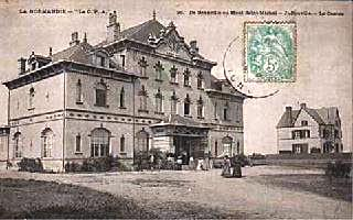 Carte postale ancienne du Casino de Jullouville